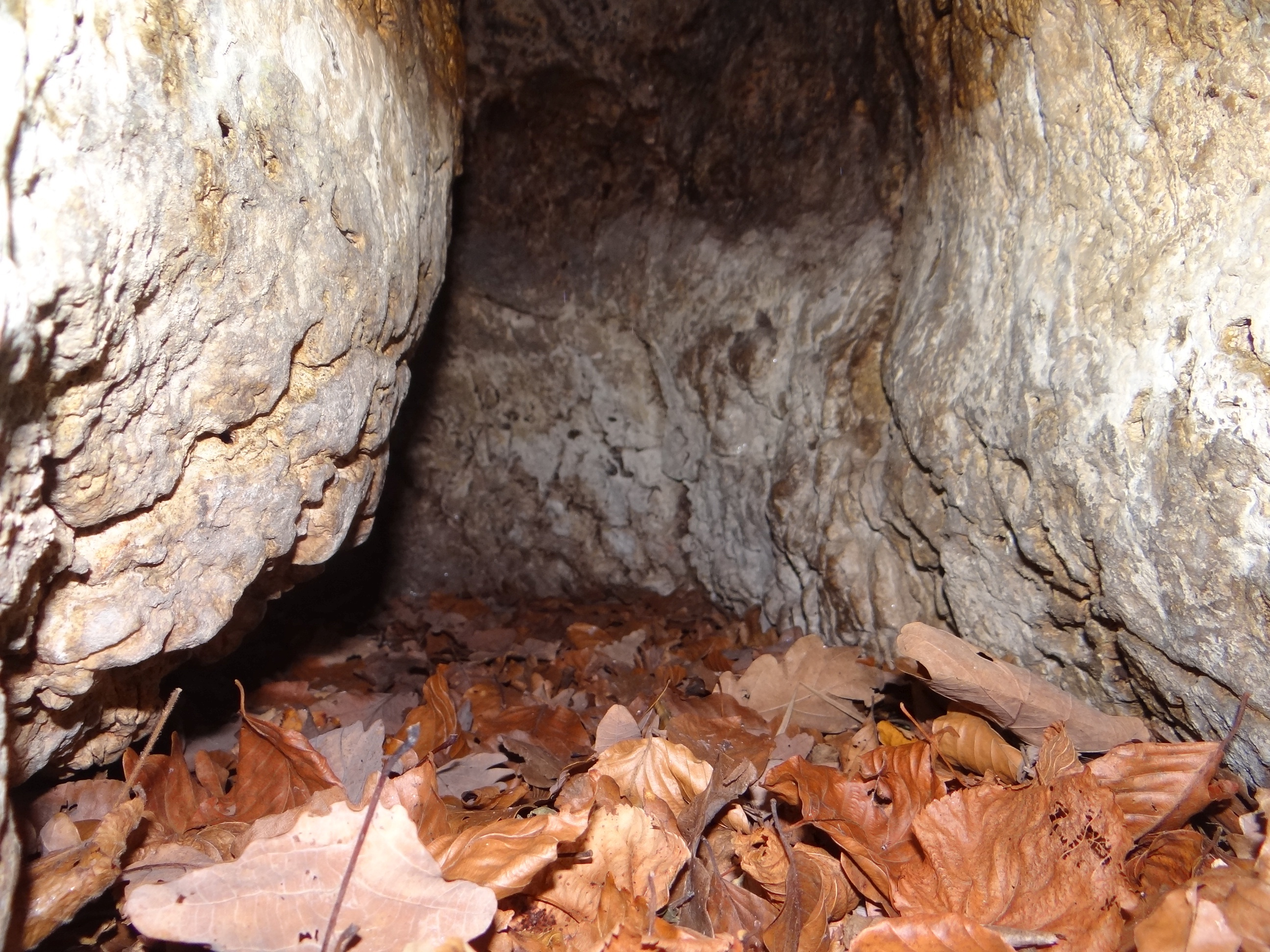 Jaskinia Księżycowa w wąwozie Półrzeczki na Wyżynie Krakowsko-Częstochowskiej